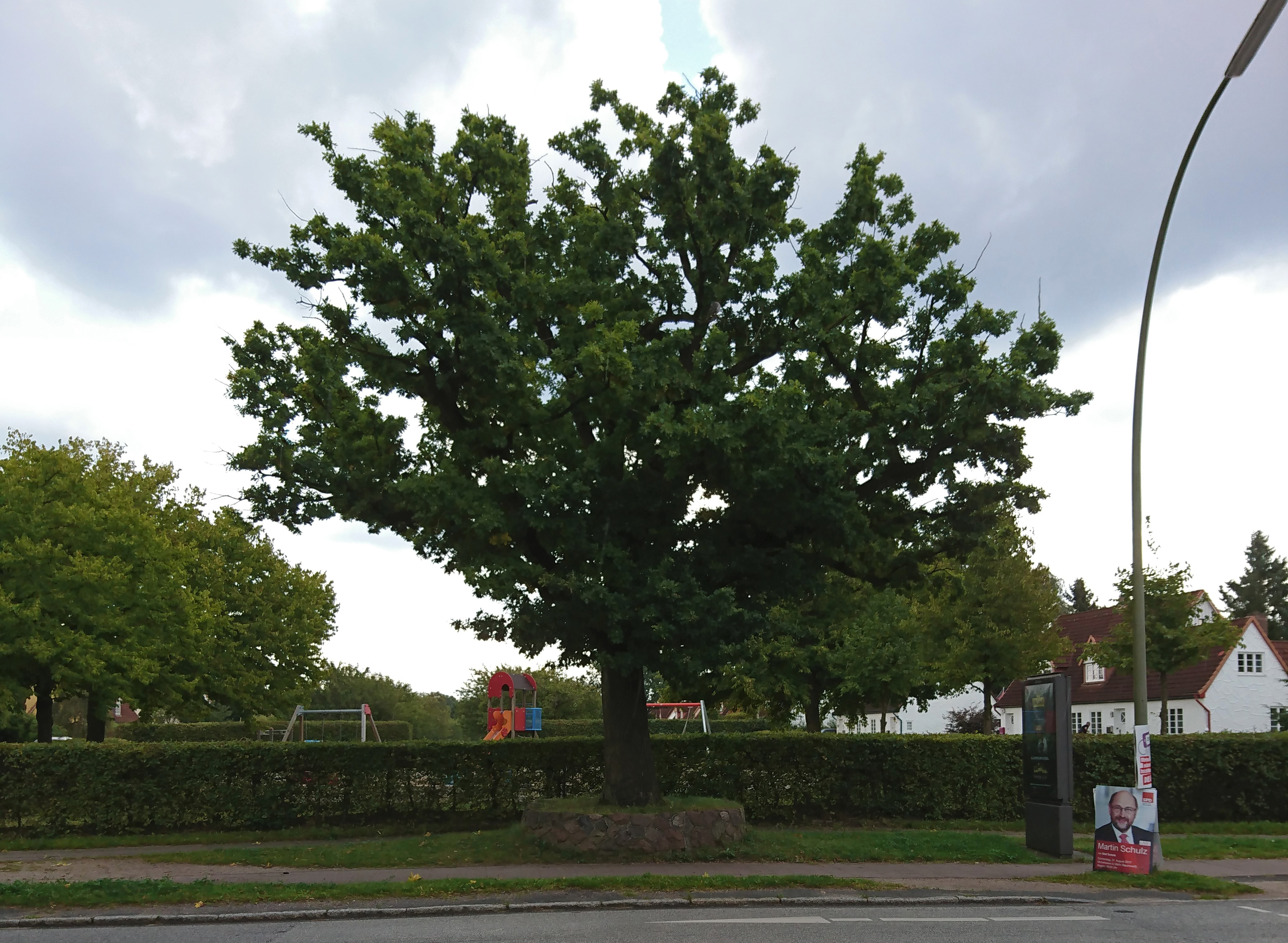 Zu Ehren Friedrich Eberts erhielt nach dem Bau der Fritz-Schumacher-Siedlung die Eiche an der Kreuzung Im Häben (seit 1950 Immenhöven) und Tangstedter Landstraße von den Siedlern den Namen Ebert-Eiche. Quelle